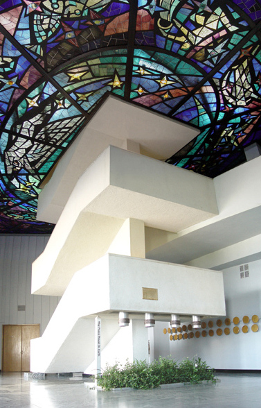 Главная обсерватория внутри (trans. "Main observatory inside")